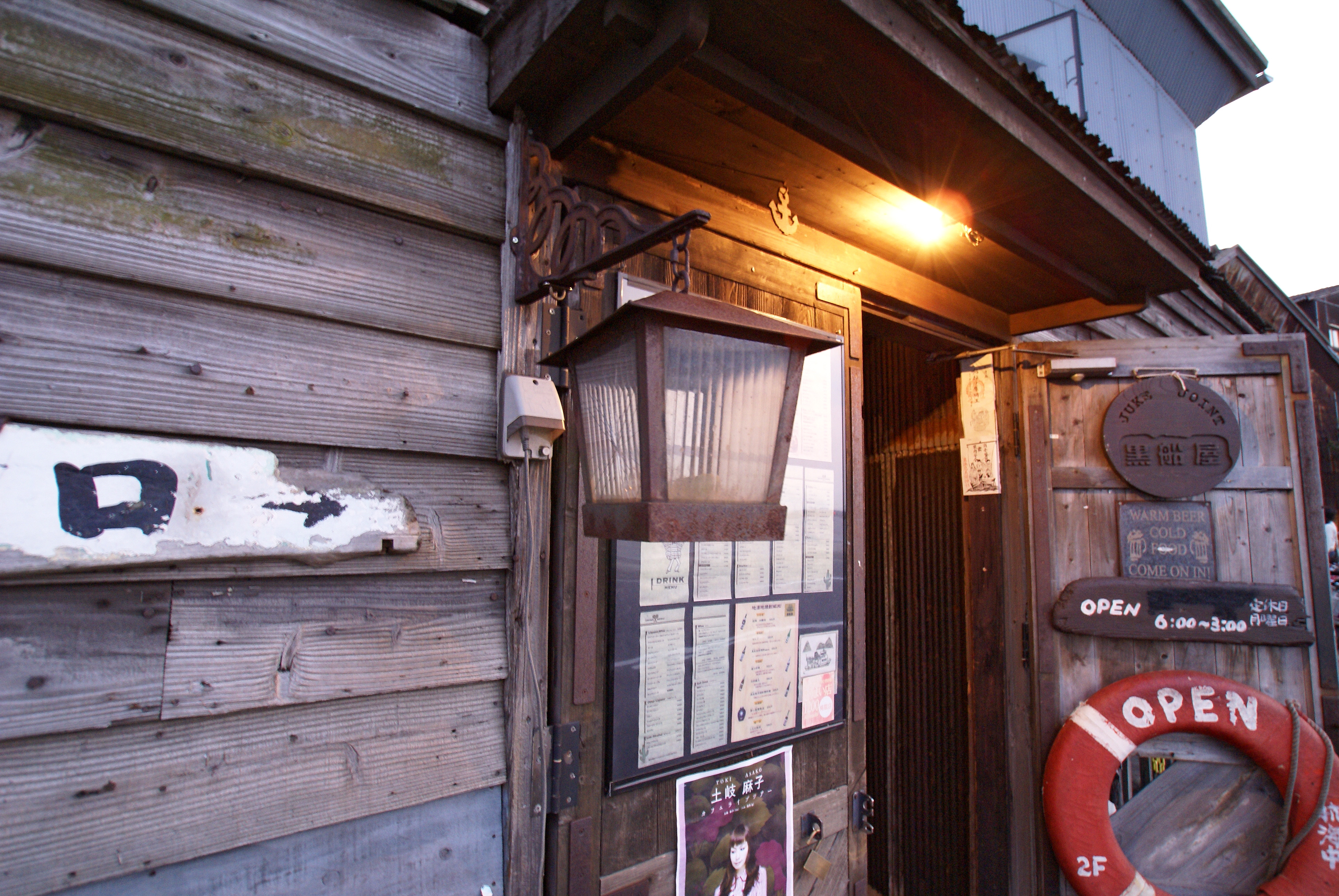 Kitahama-alley in Takamatsu, Kagawa prefecture, Japan